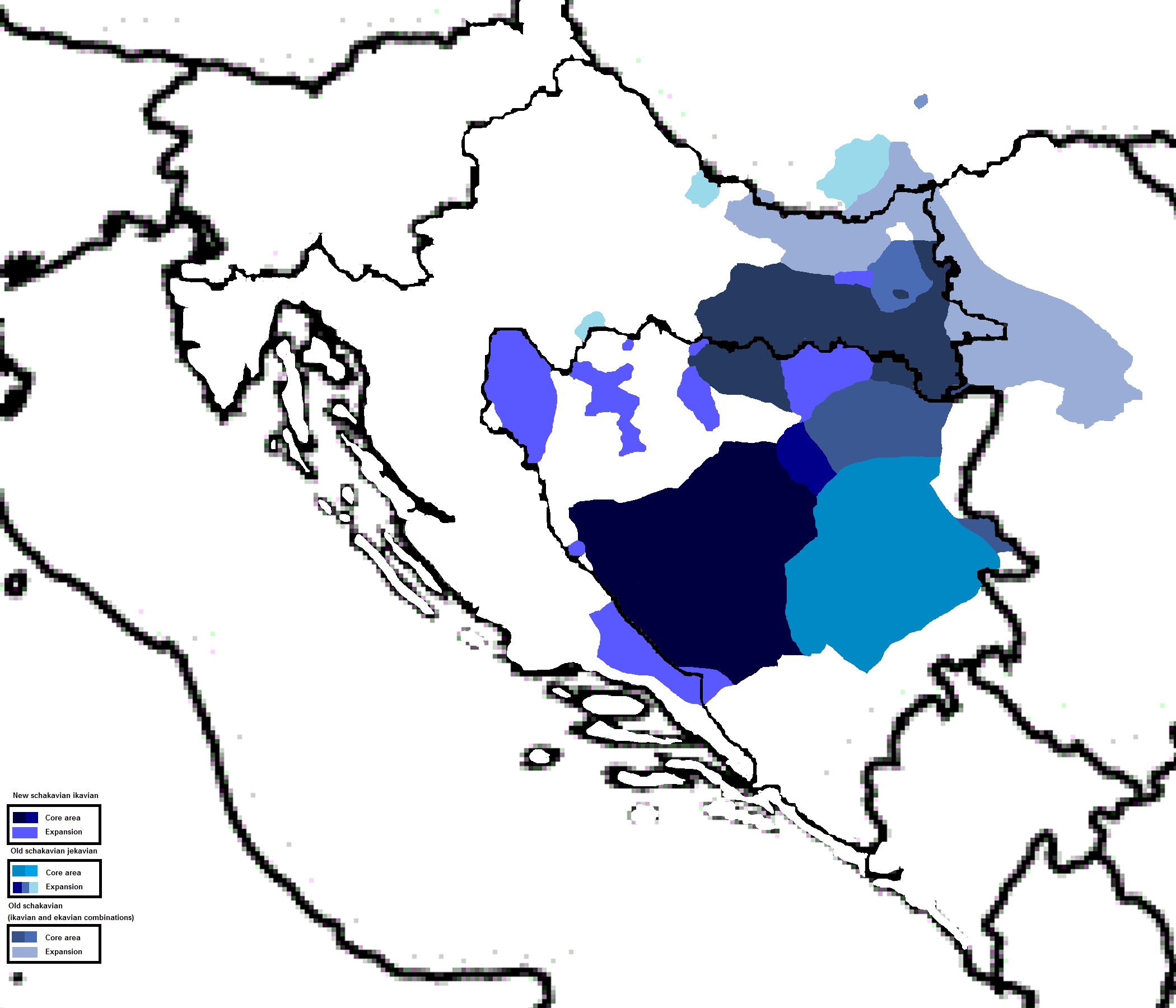 migracije šćakavaca (Šokci, Bošnjaci....) iz regija jezgre oko rijeke Bosne, južne Slavonije i Završja u Podunavlje, Pounje i Podravinu